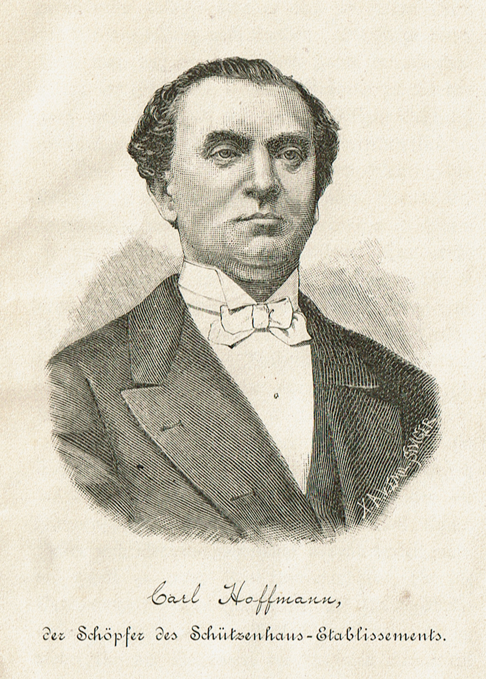 Carl Hoffmann (1823-1873), Begründer des Leipziger Schützenhaus-Etablissements